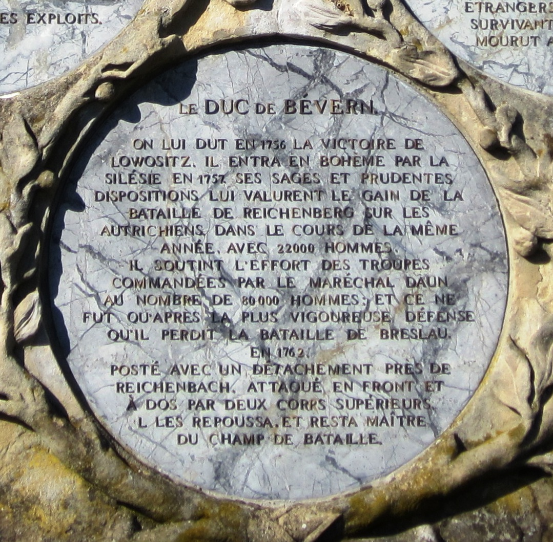 Tafel für August Wilhelm von Braunschweig-Wolfenbüttel-Bevern (1715–1781) am Obelisken in Rheinsberg